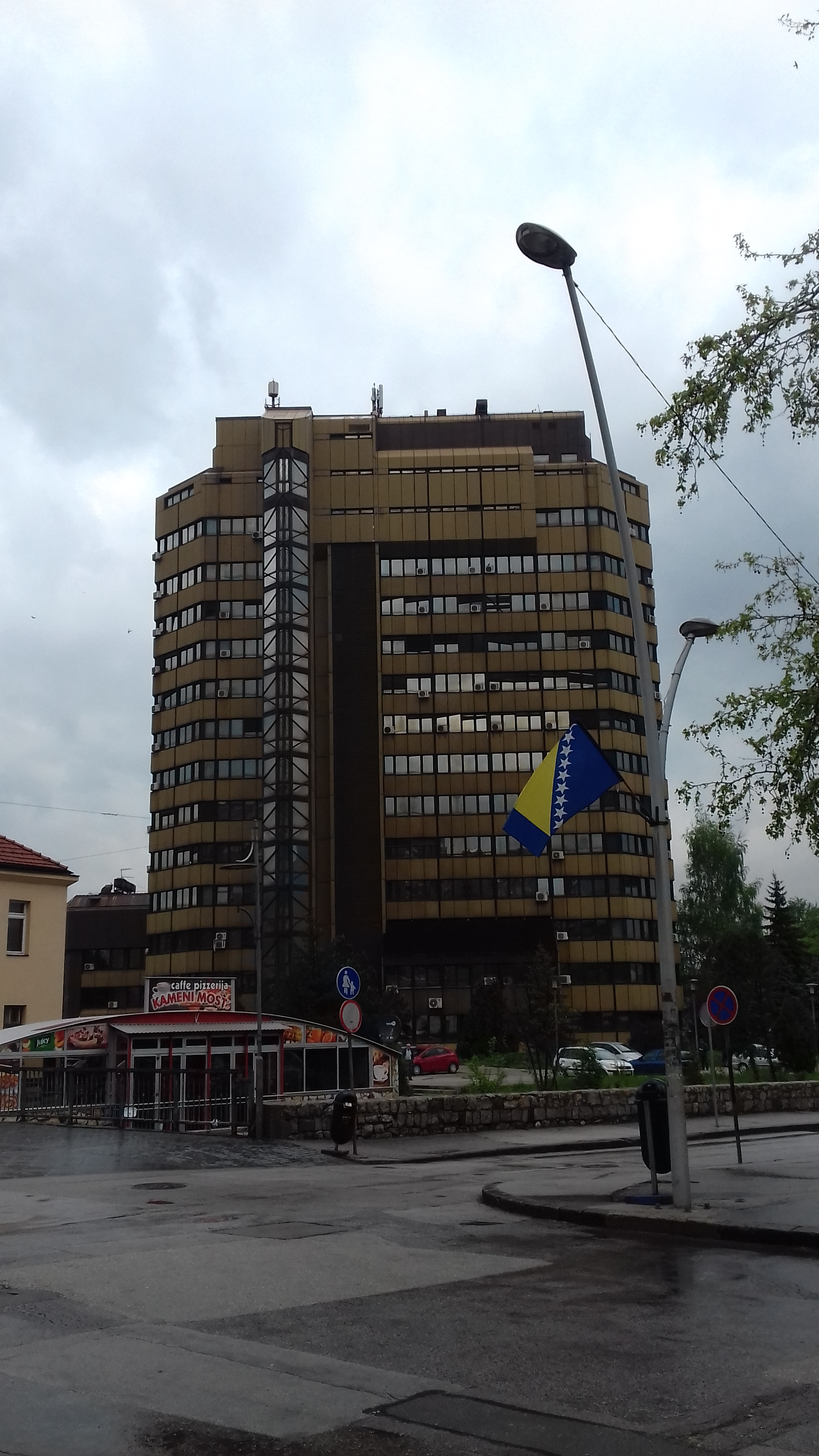 Зграда РМК